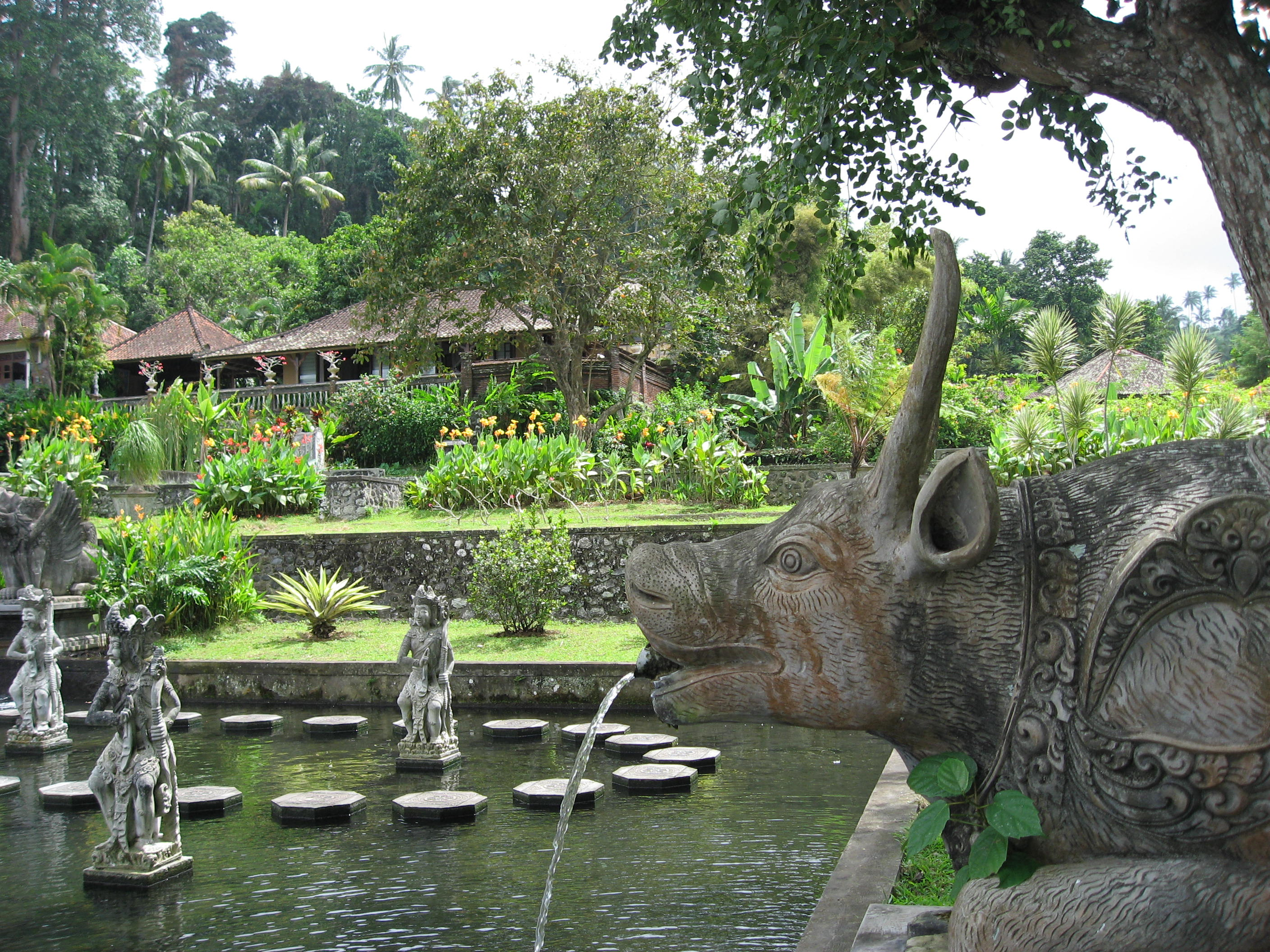 Tirtagangga water garden Map: 8° 24' 44" S 115° 35' 13" E